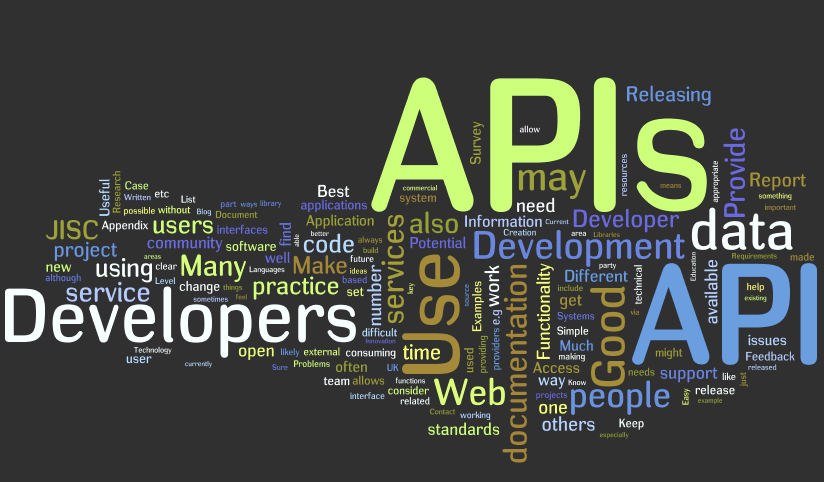 Монгол: Аппликейшн програмчлалын интерфейс